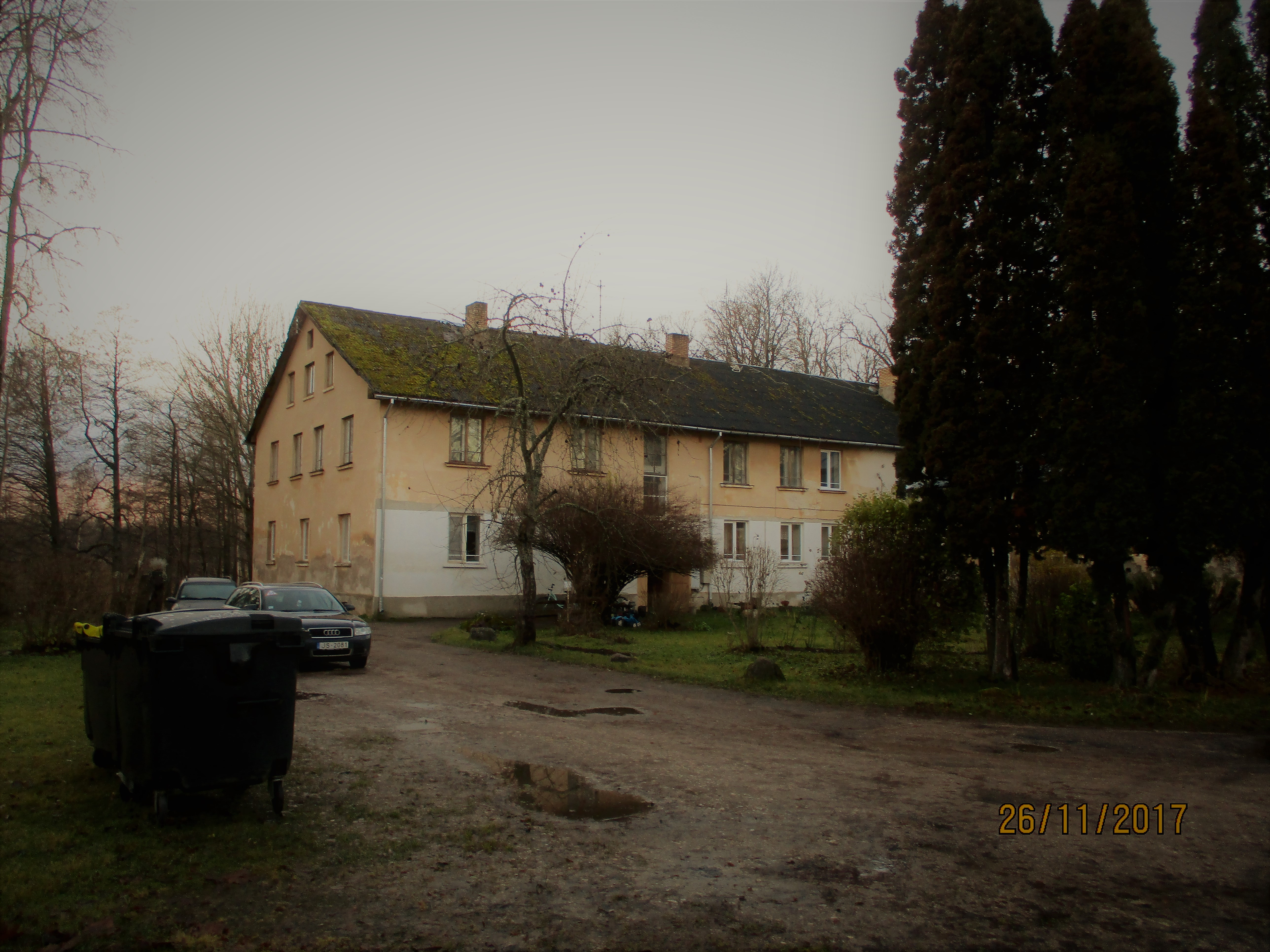 Vaade kagusuunast mõisale ja selle ees olevale platsile.